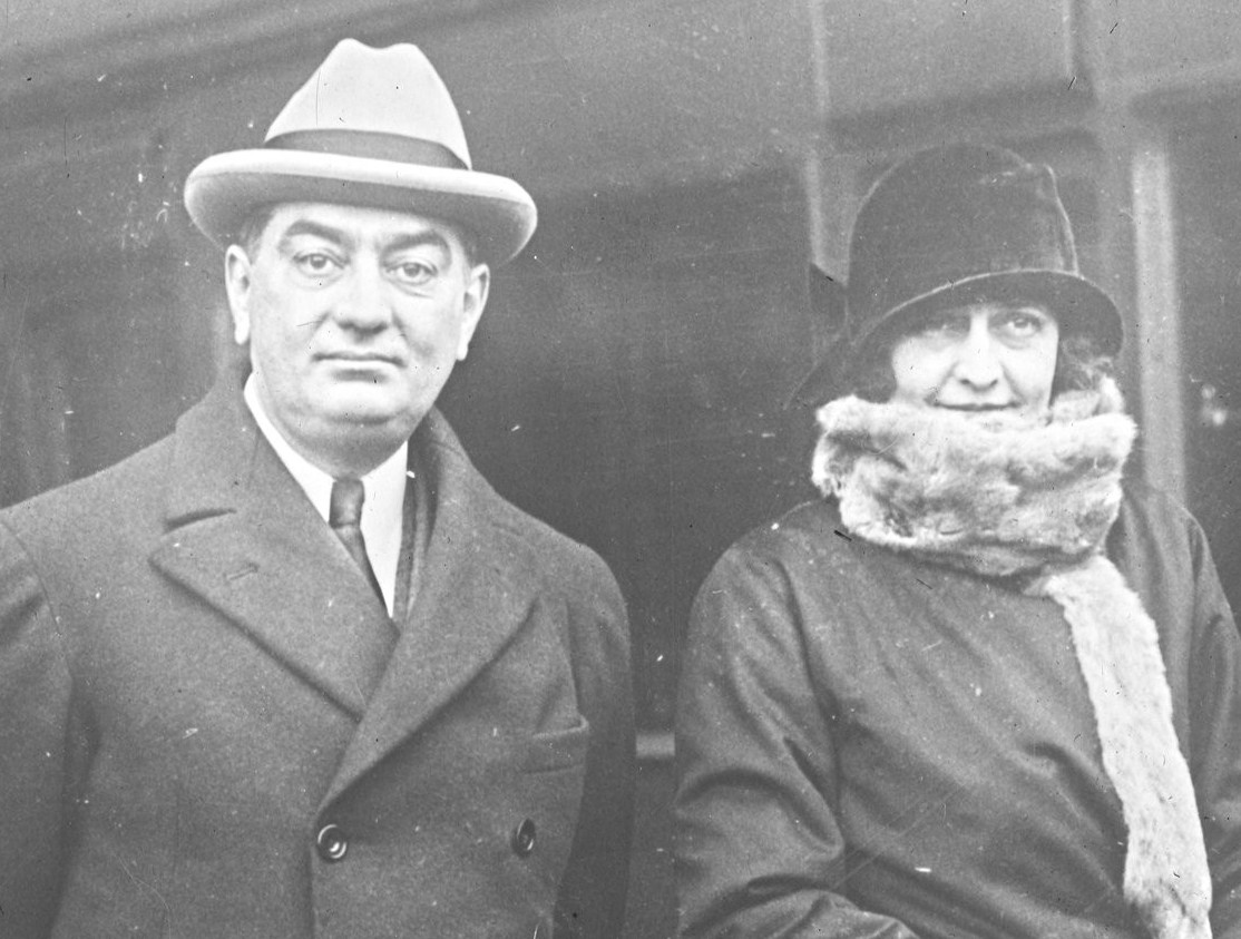 M. [Agustin Edwards] et Mme Edwards, ministre du Chili [gare de Waterloo, 12 décembre 1924] (CNews) : [photographie de presse] /